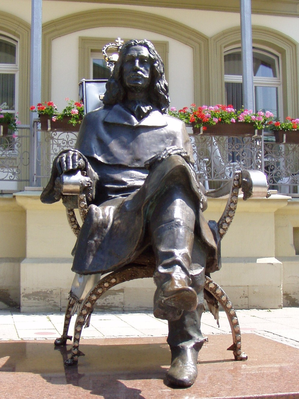 Imre Varga (Budapest, 1991): „Franz II. Rákóczi“; Location: Kurhausstraße, Bad Kissingen (Bavaria)